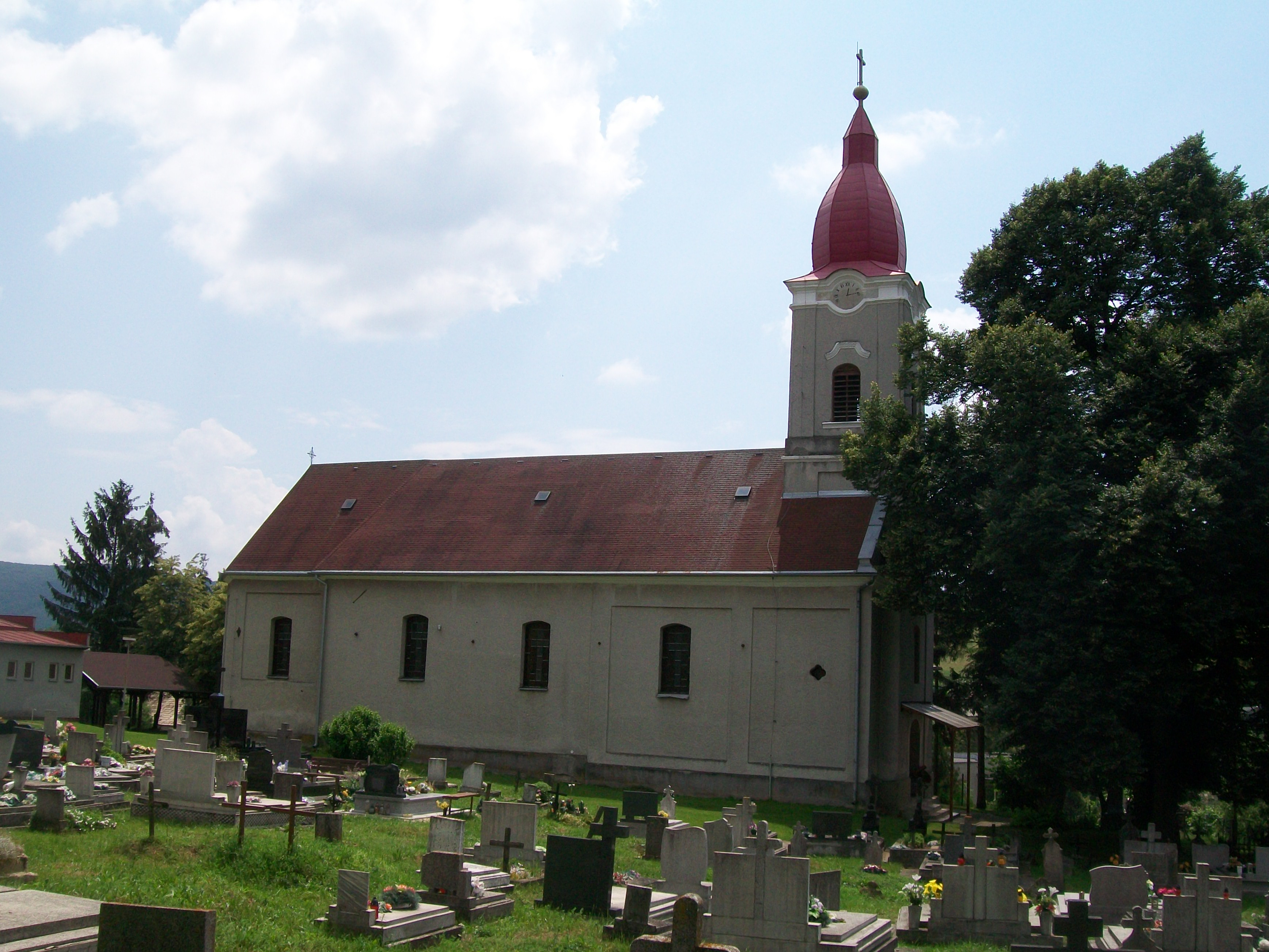 Rímskokatolícky kostol Ducha Svätého v obci Šávoľ